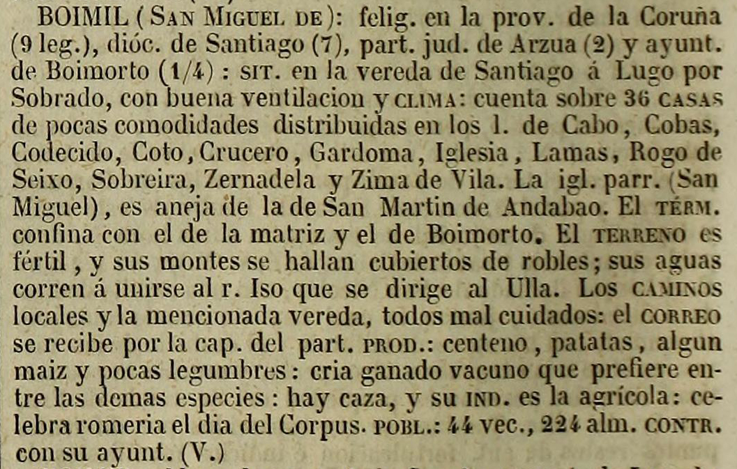 Boimil no Diccionario geográfico-estadístico-histórico de España y sus posesiones de Ultramar.